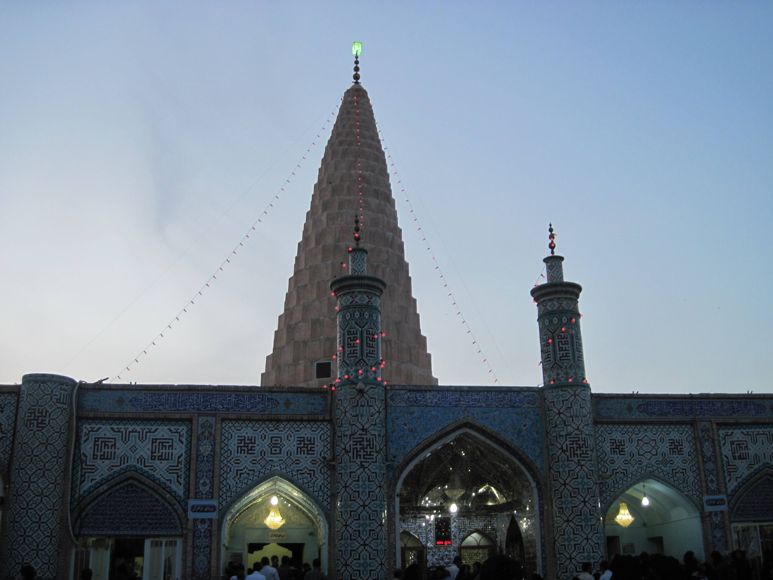 آرامگاه دانیال نبی واقع در شوش